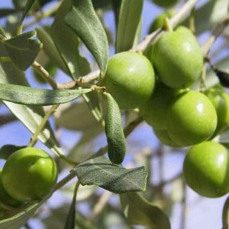 Olives